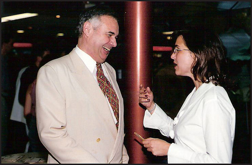 Musicólogo Arnaldo Senise e jornalista Heloisa Fischer. Livraria Saraiva Mega Store, Shopping Eldorado. São Paulo. Abril de 2000.